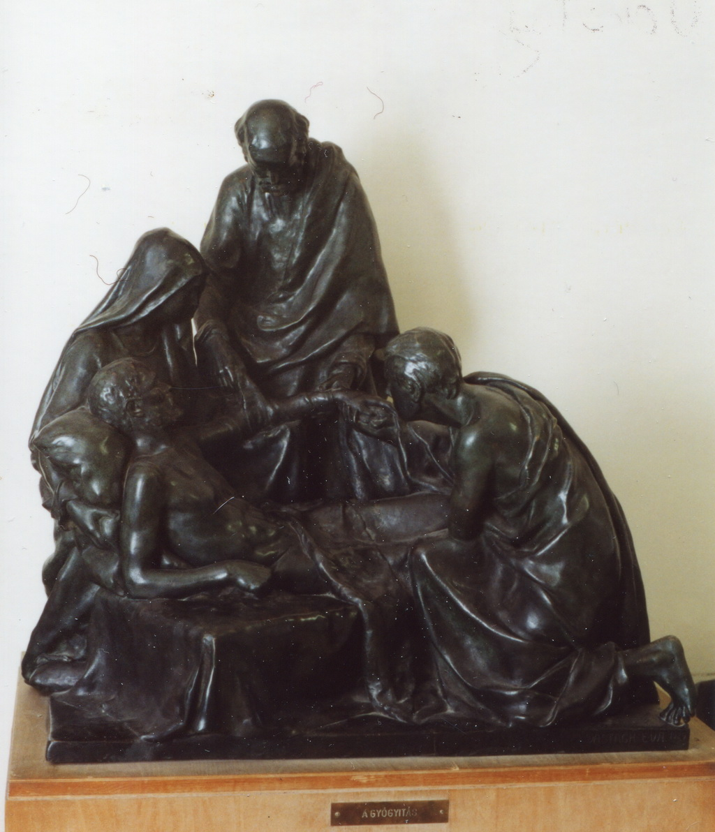 Beteg gyógyítását ábrázoló jelenet (Budapest, Semmelweis Egyetem Radiológiai Klinika)